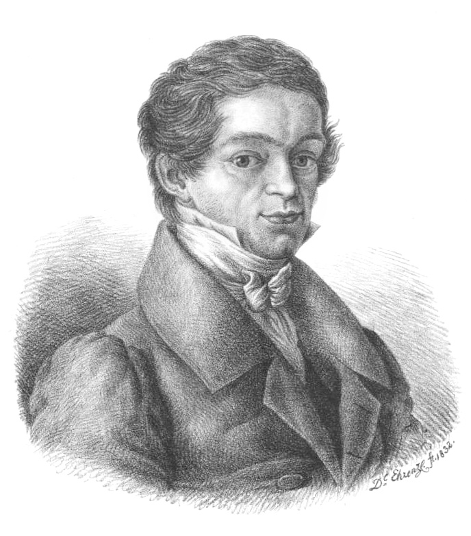 retouchiertes Porträt des St. Galler Ratsschreibers August Näf